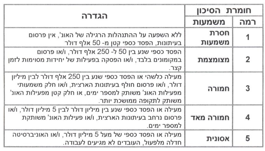 הגדרות לחומרת הסיכון